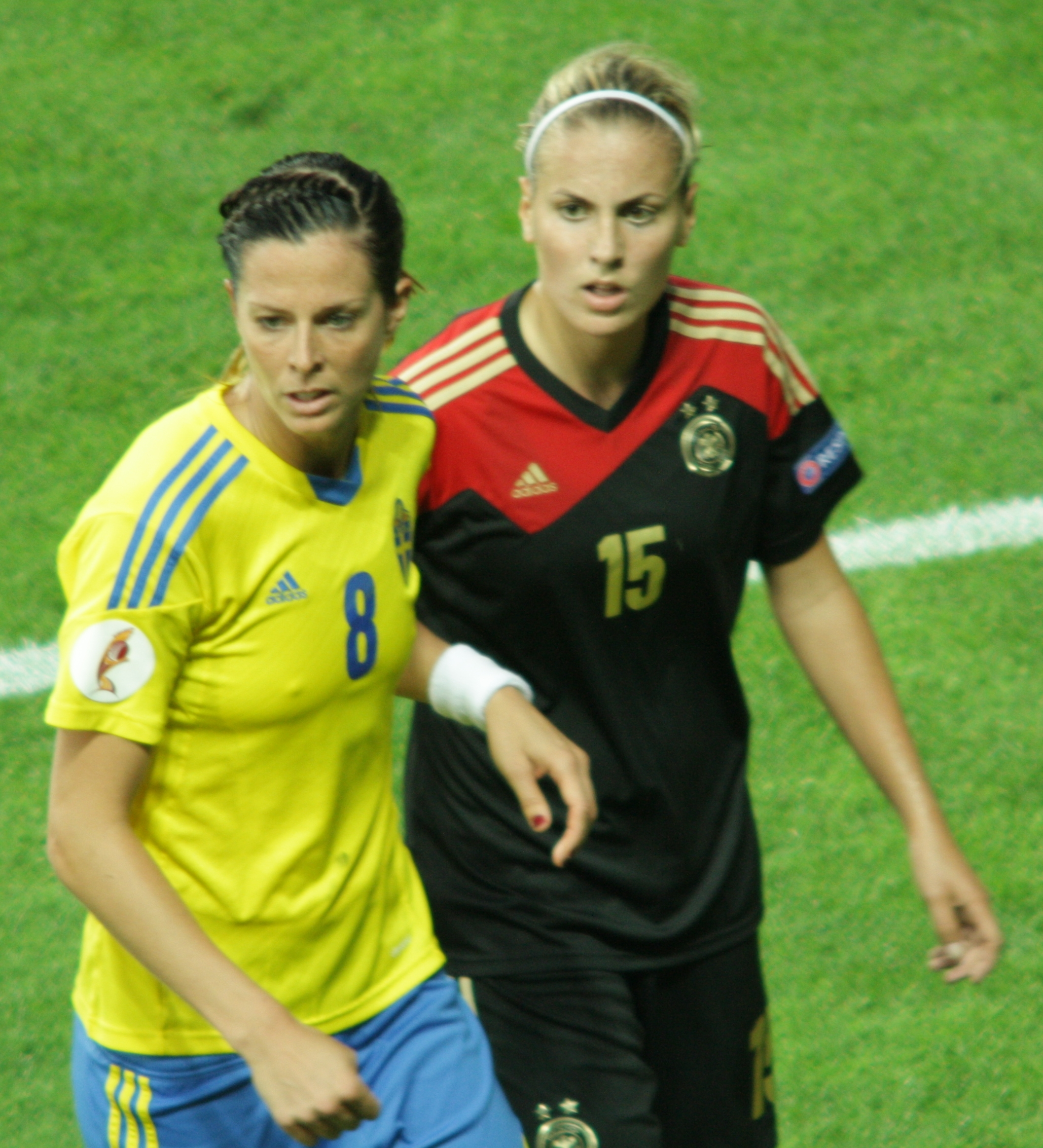 Schelin vs Cramer